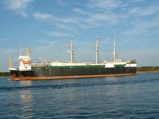 Comdock V mit Towarisch